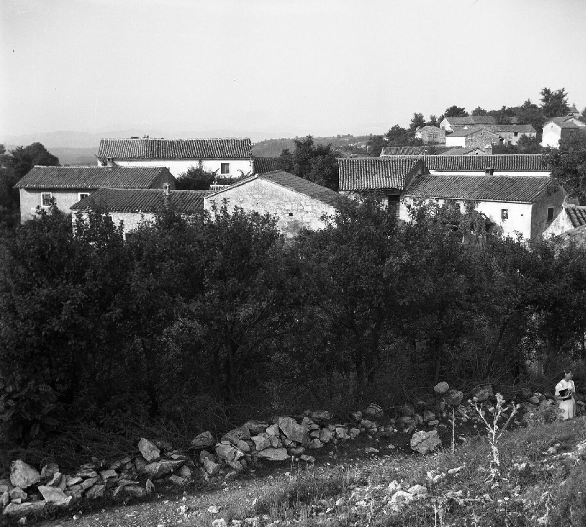 Del vasi Račice.